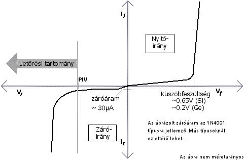 A dióda áram-feszültség diagramja